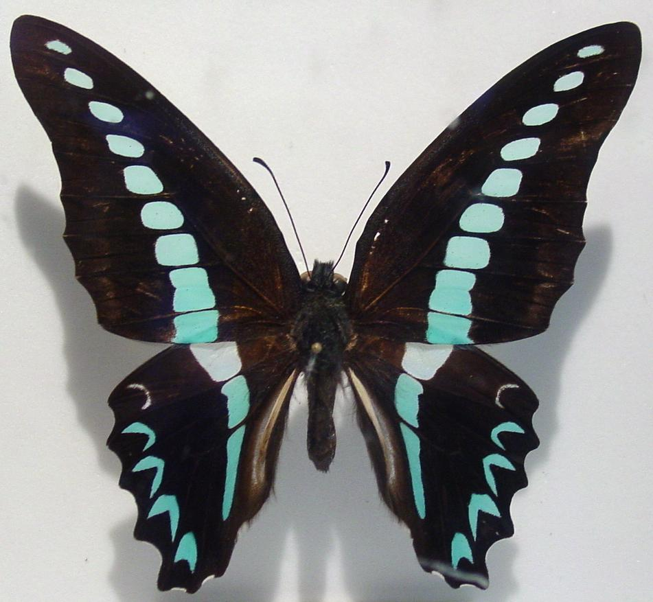 self made